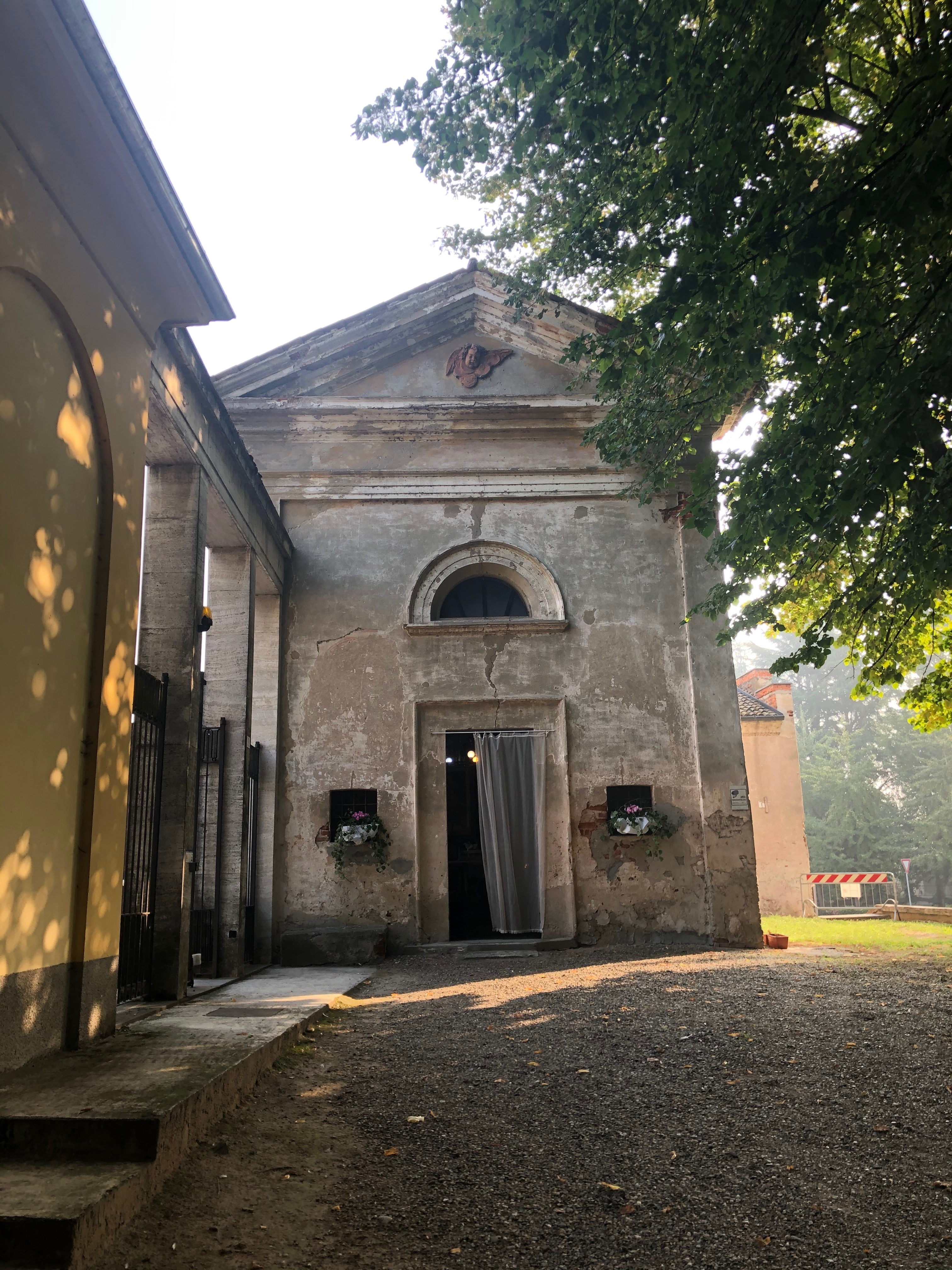 Facciata della chiesa di San Martino a Cilavegna